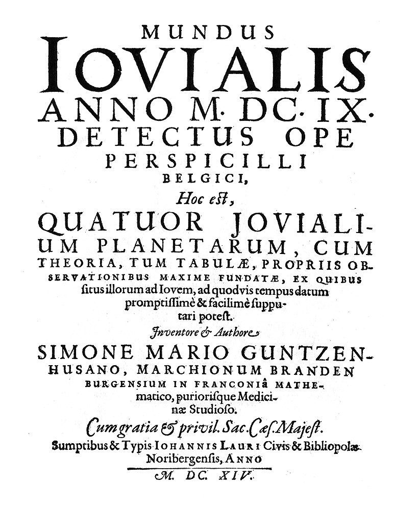 La prima pagina di Mundus Iovialis